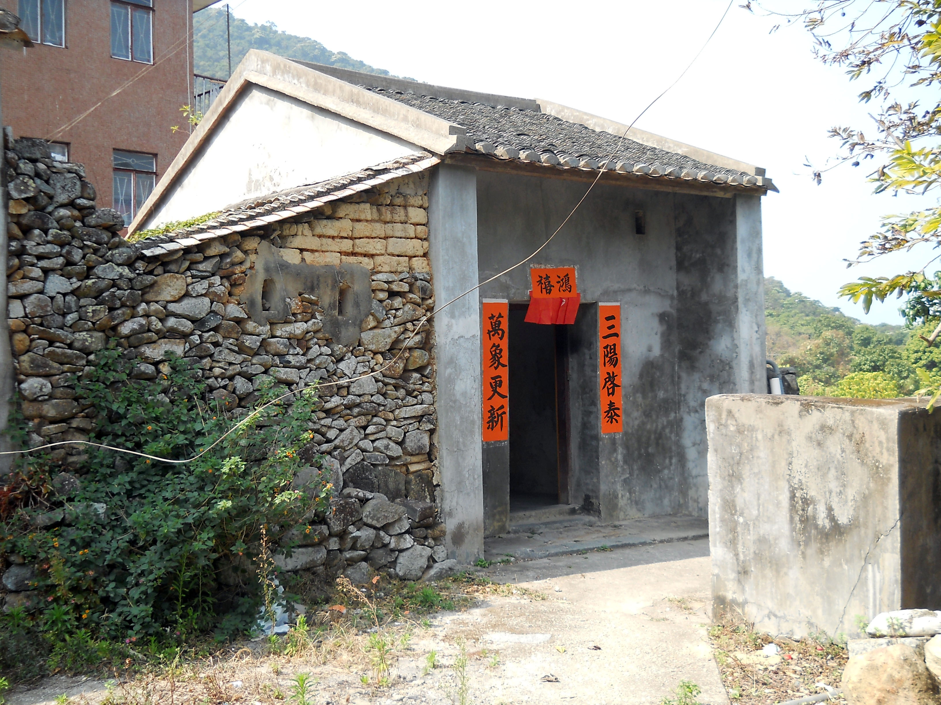 中文（香港）: 企嶺下老圍